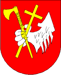 Chodsky ujezd znak